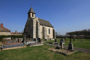 église de Chauffour lès étrechy